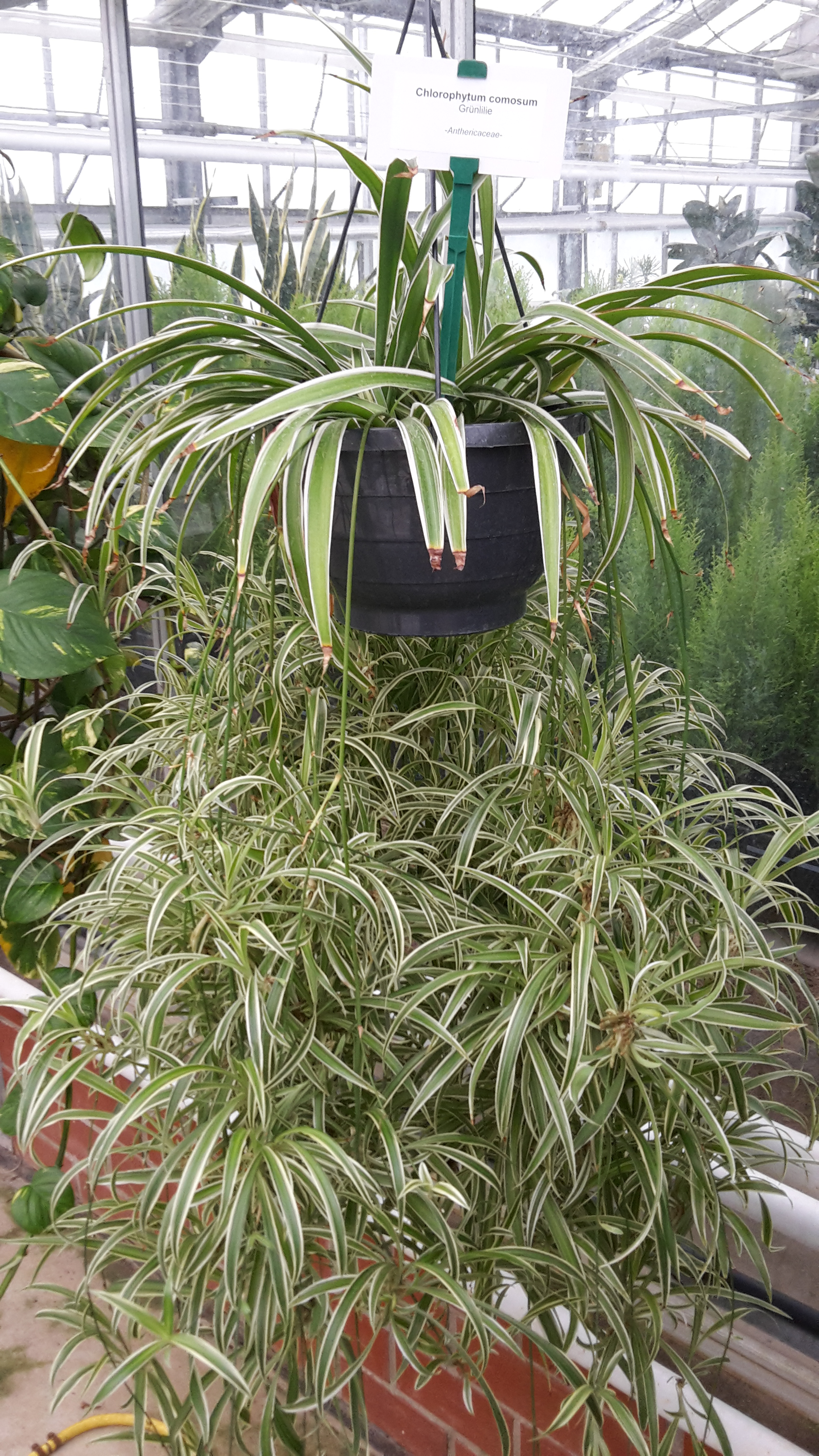 Chlorophytum comosum in Blumenampel